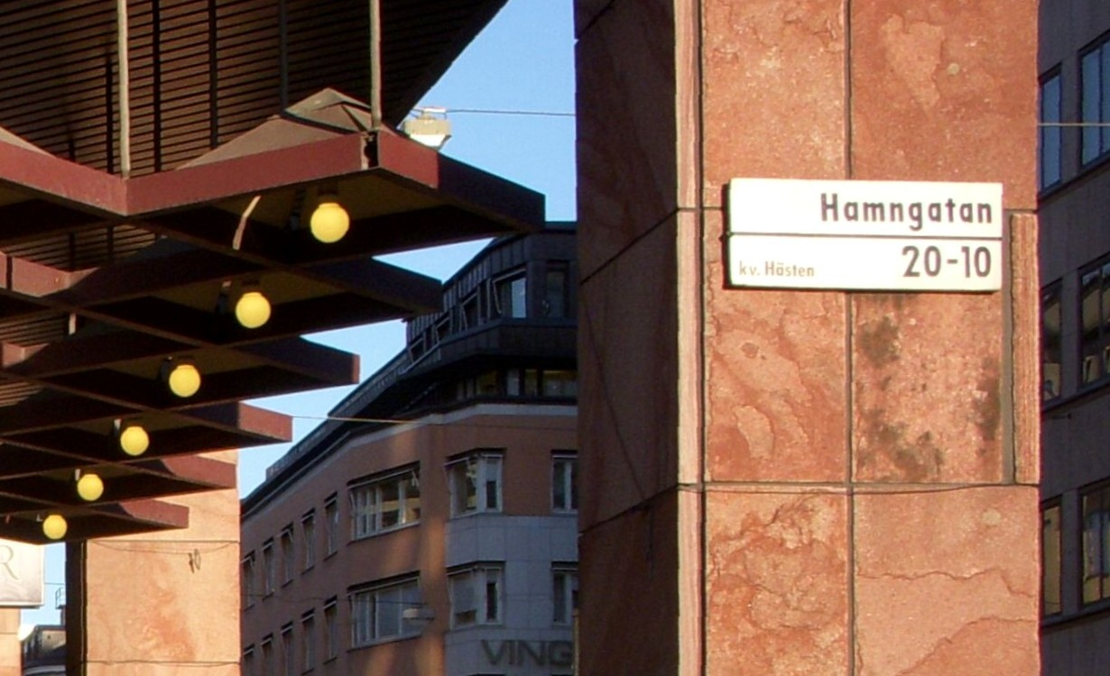 Kvarteret Hästen, Hamngatan, Stockholm